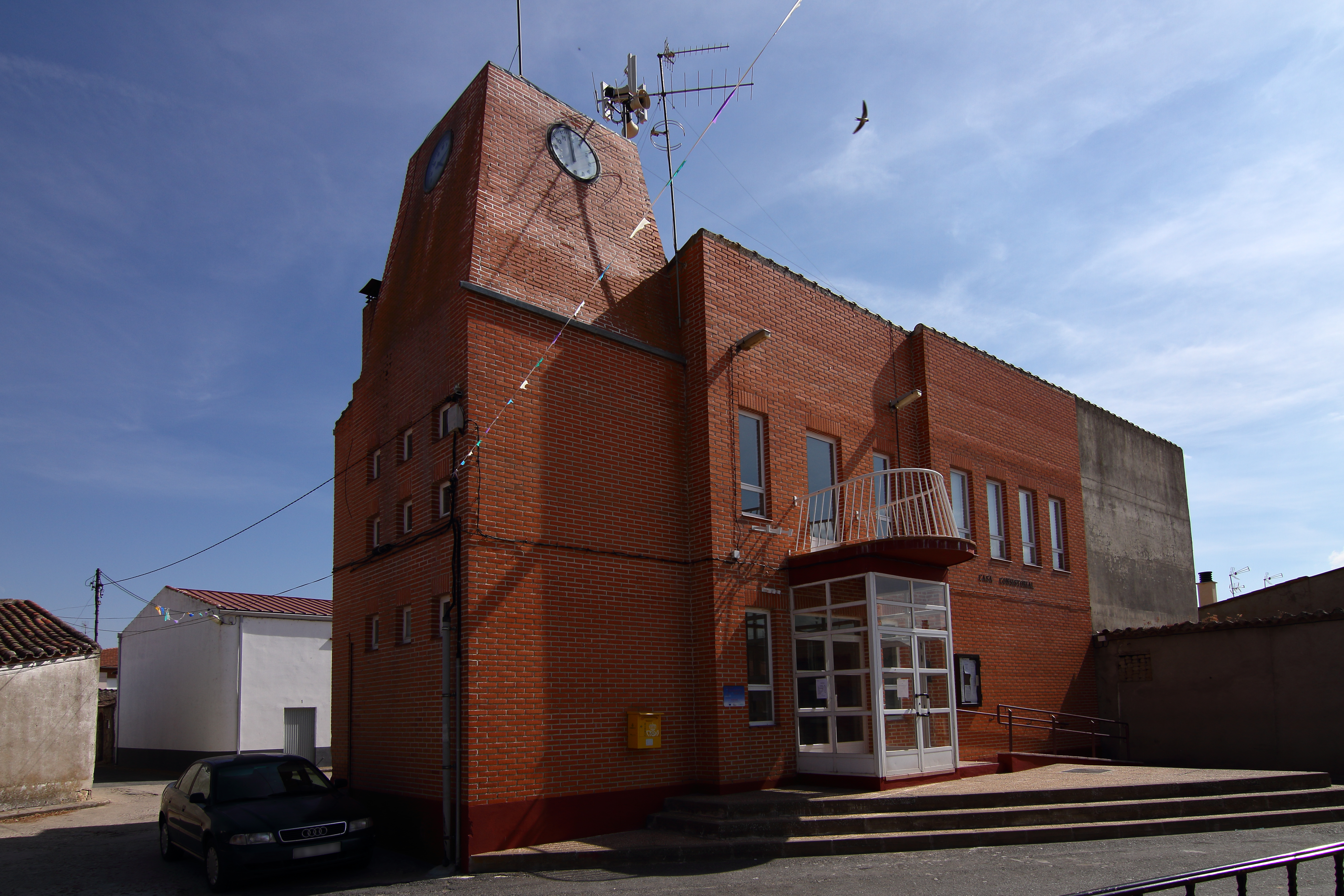 Casa Consistorial de Garcihernandez